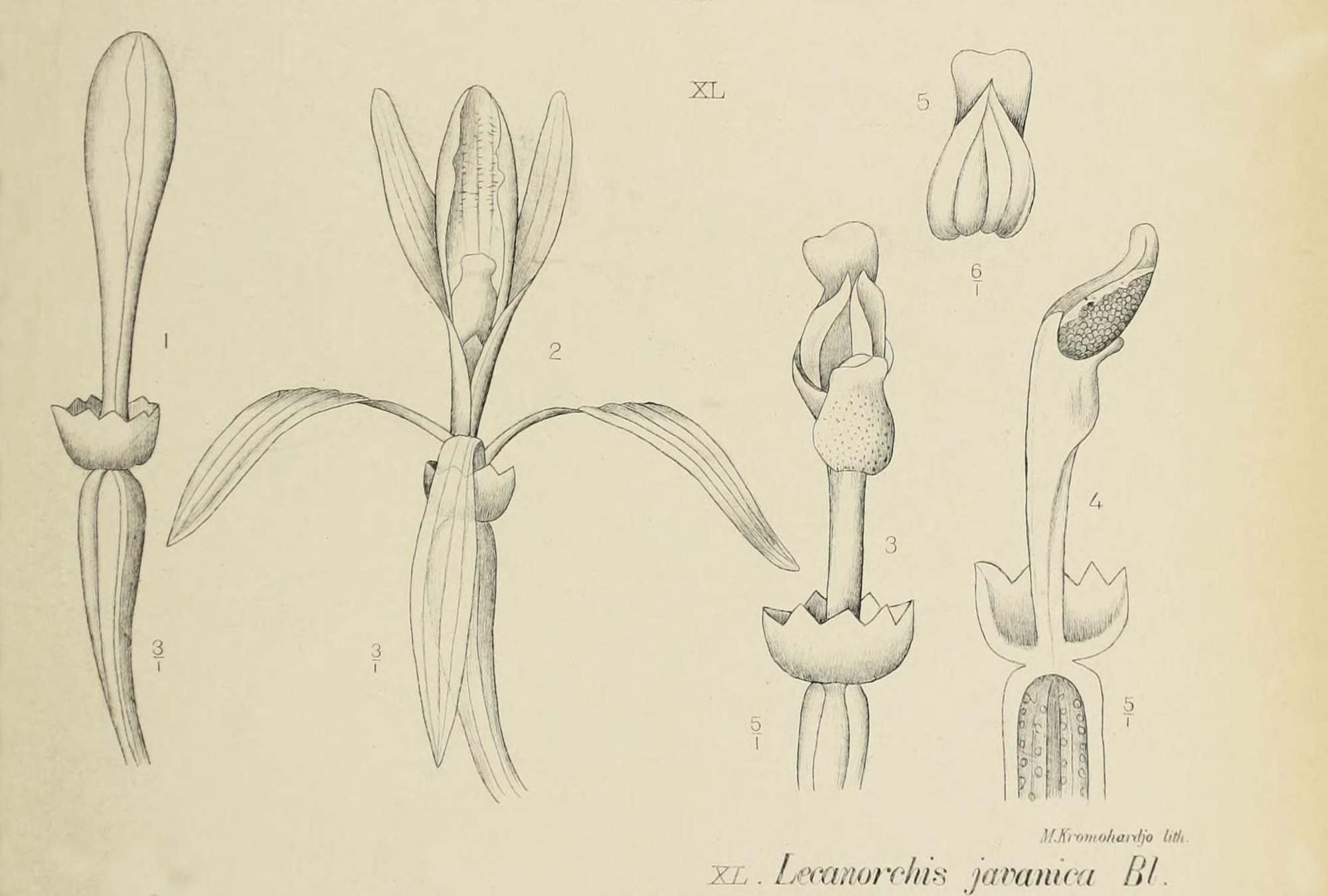 Die orchideen von Java /